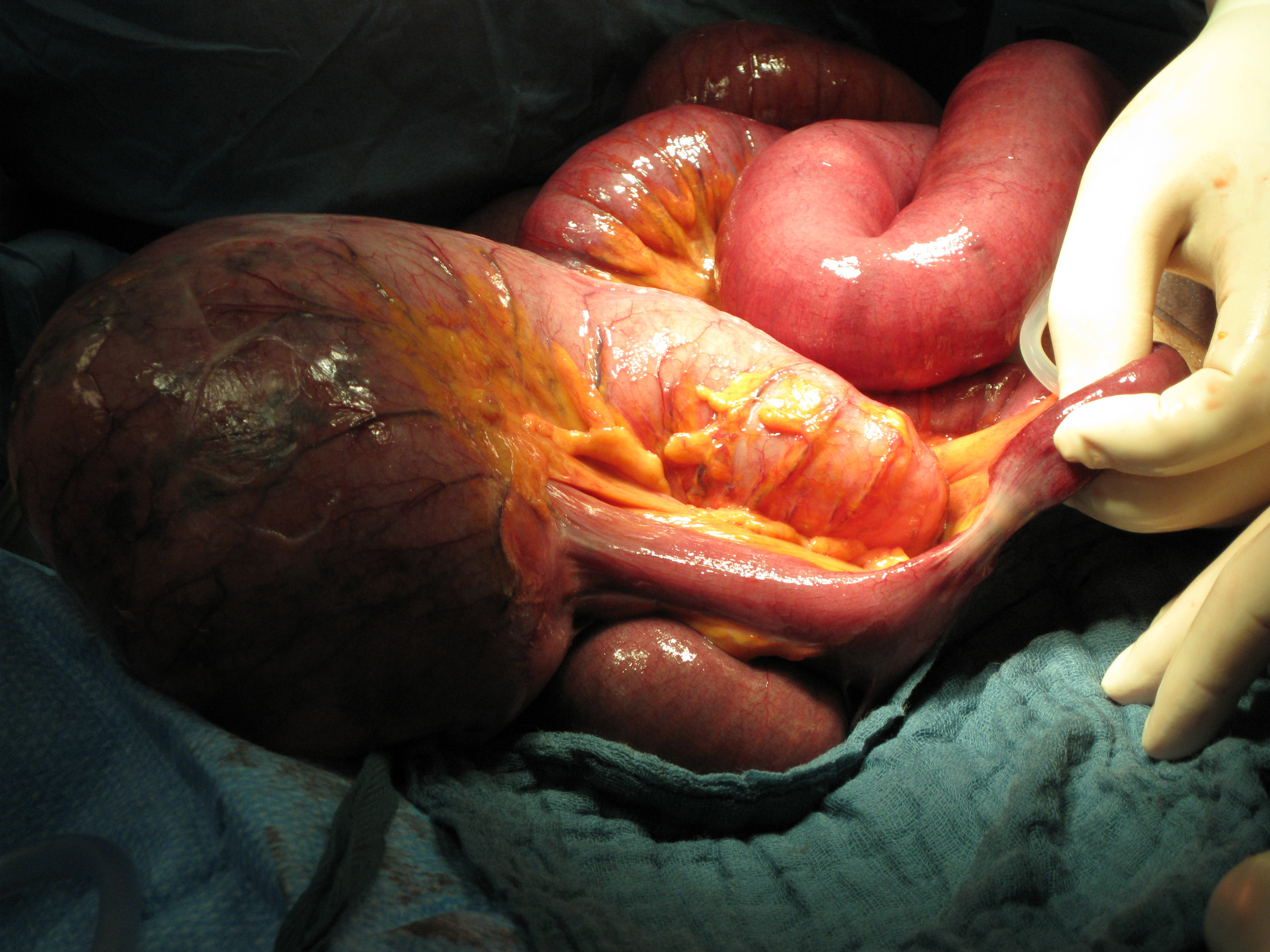 Torsionsileus (intraoperativer Situs): Darmverschluss durch vollständige Verdrehung des Cökums (Blinddarms). Am Dünndarm sieht man die eingeschnürte Engstelle, das Cökum ist maximal überbläht. Version mit korrektem Dateinamen